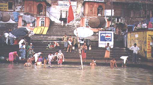 nå läskig liten chilli sak